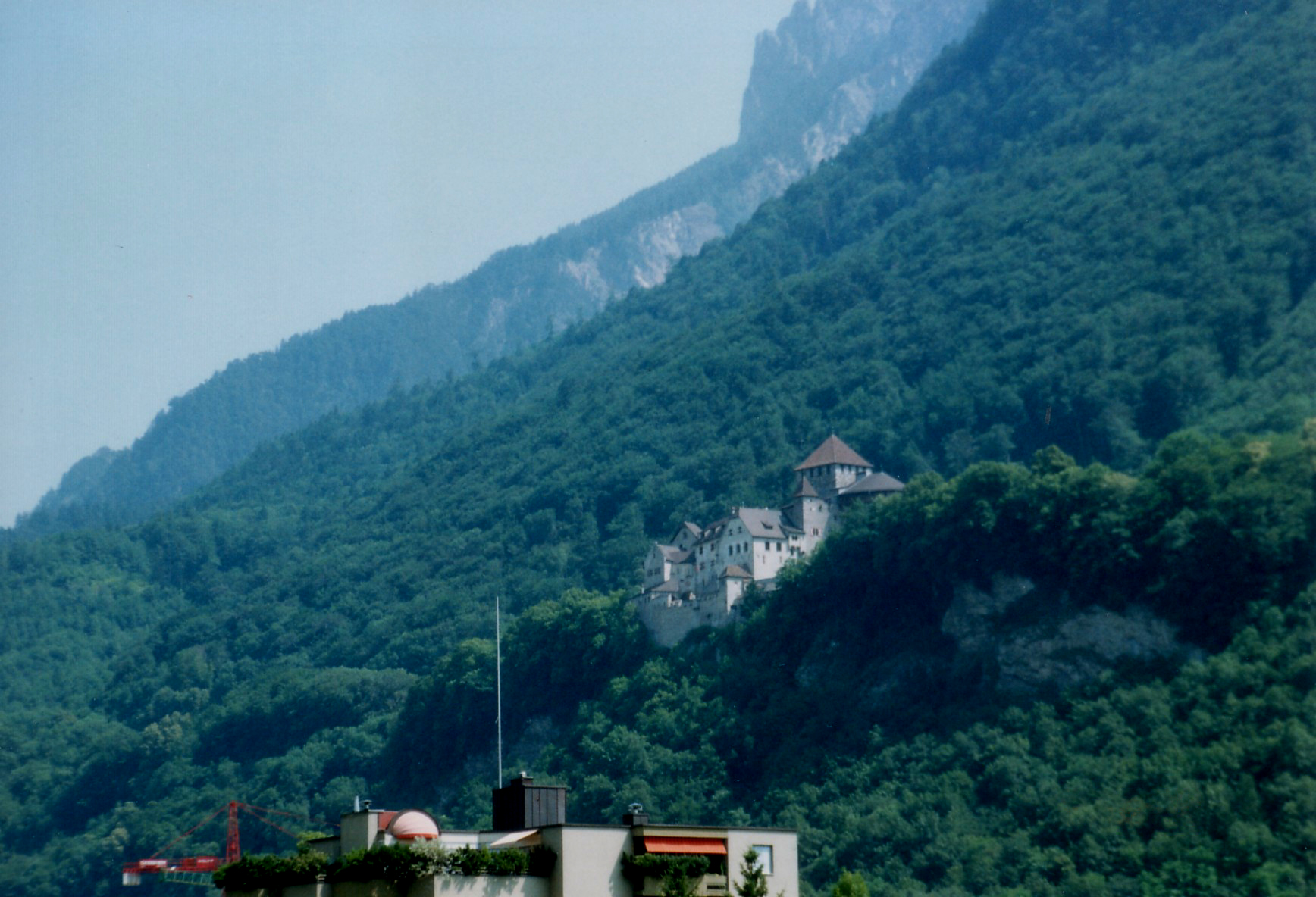 Vaduz Castle, in Vaduz, Liechtenstein